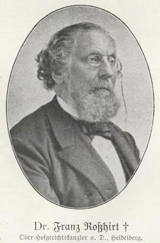 Franz Roßhirt (1820-1887), Abgeordneter des Deutschen Reichstages, Präsident des 30. Deutschen Katholikentags, Düsseldorf, 1883